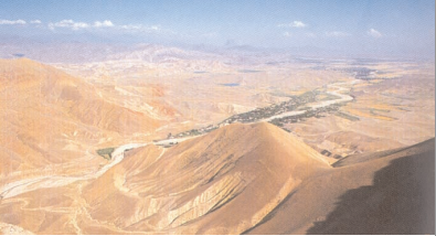 Cəhriçay